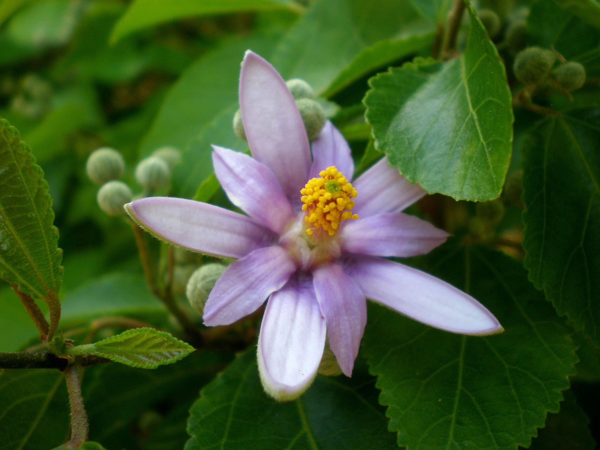 Jardín Botánico de Barcelona.